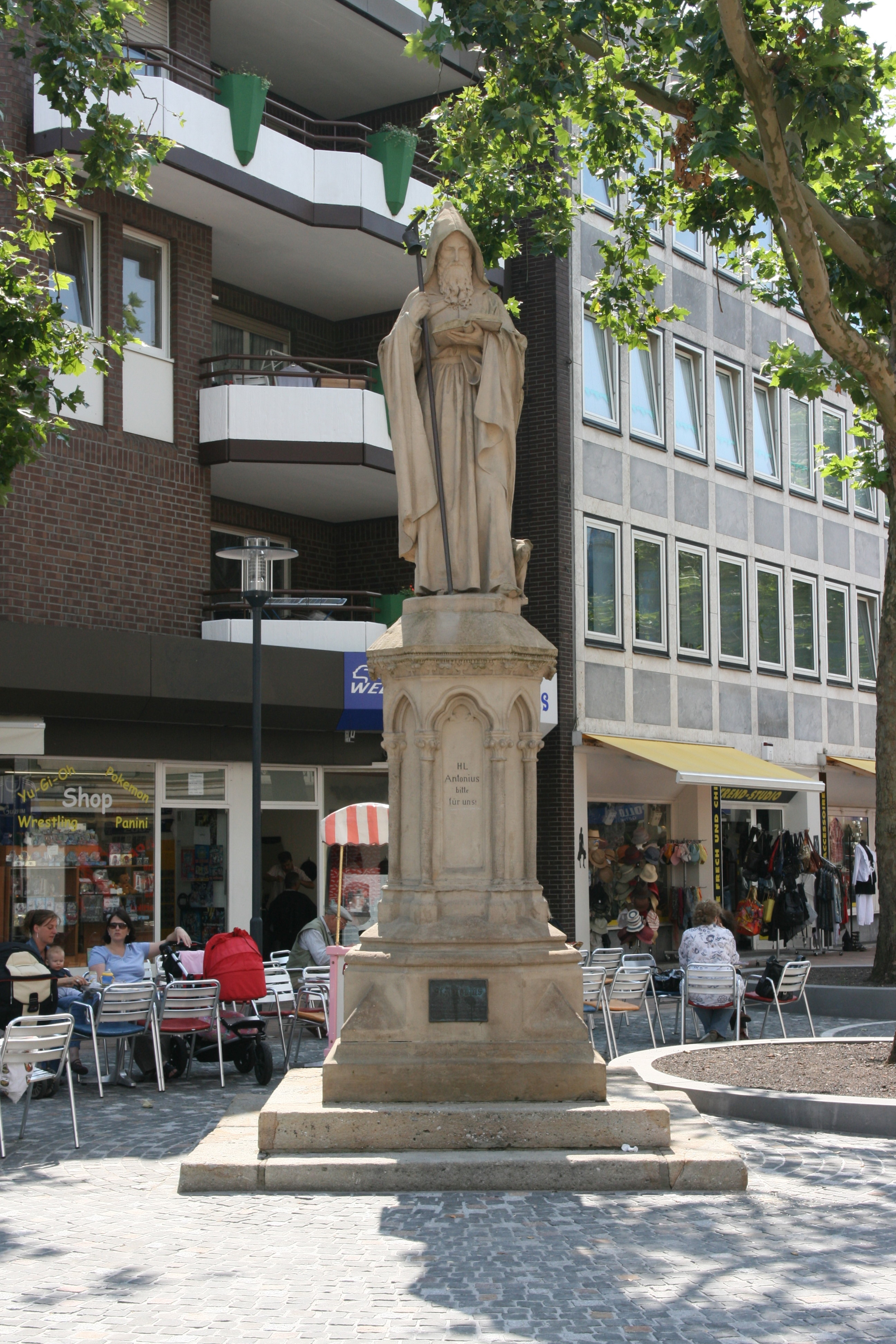 Antoniusdenkmal von Wilhelm Bolte auf der Antoniusstraße in Herten